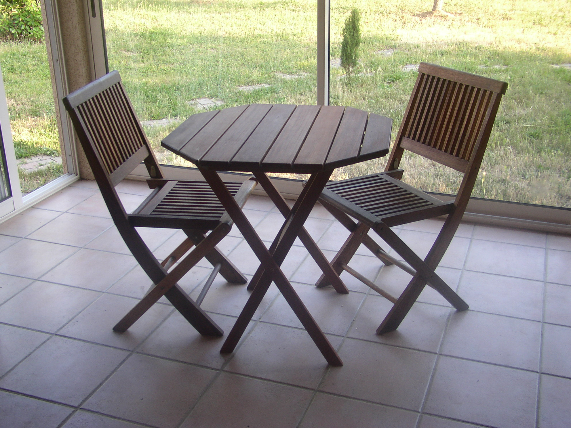 Table pliante en bankiraï (yellow balau) Appareil olympus 3Mpixel auteur Daniel Duron (fabrication et photo)